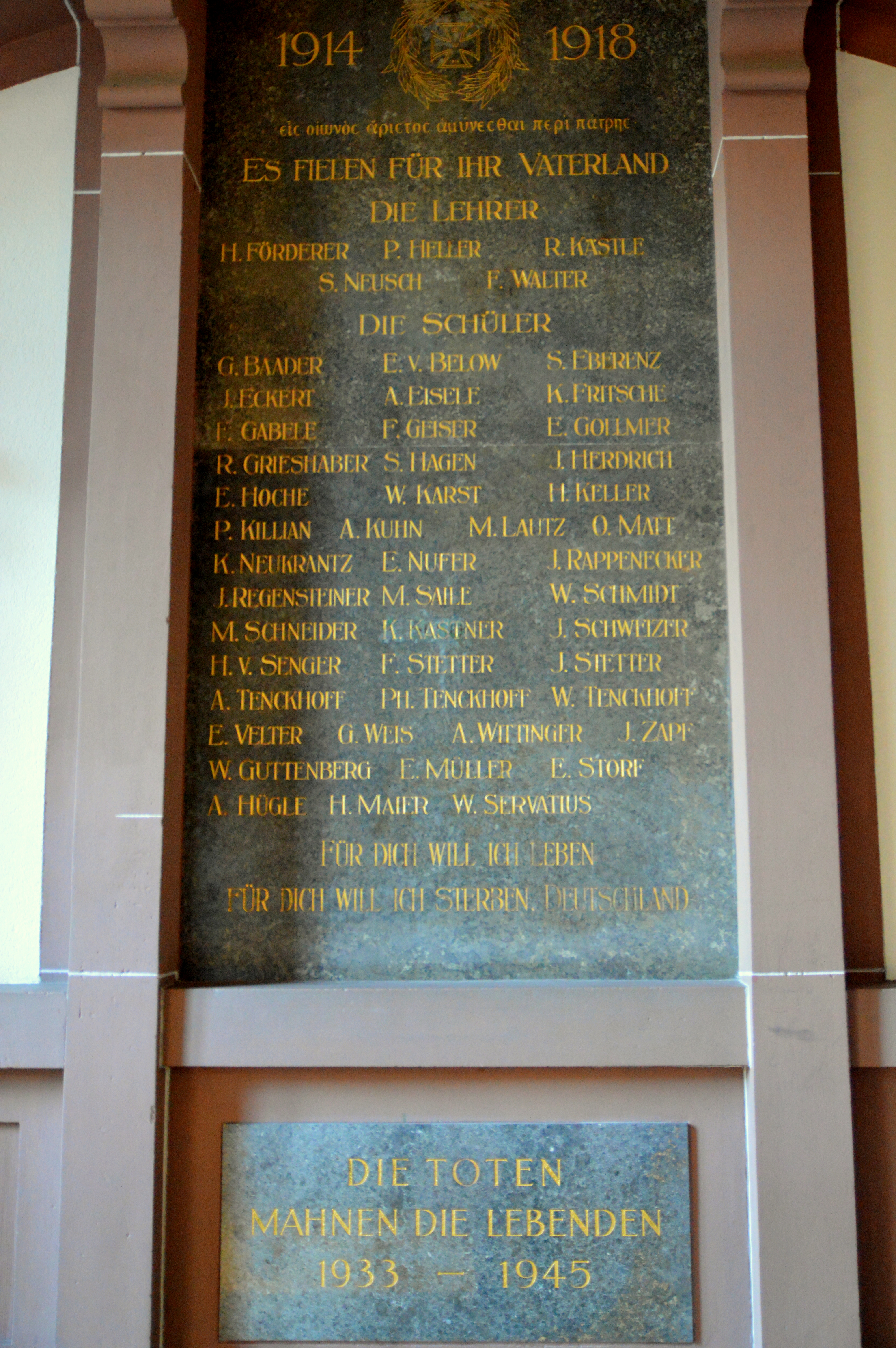 Fotografie Friedrich-Gymnasium Freiburg (im Breisgau) [FG] im Stadtteil Herdern